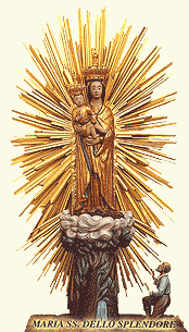 Statua lignea del XIV-XV sec incorporata in moderna raggera in legno, sacra immagine della Madonna dello Splendore che si venera nell'omonimo Santuario in Giulianova-TE